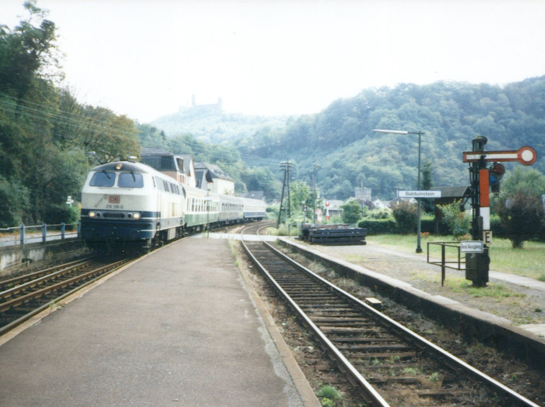 216 118 fährt am 21.08.1997 mit RB 6937 Koblenz - Gießen in den Bahnhof Balduinstein ein. Der Wagenzug besteht aus einem ABom (DR-Bauart), einem Bn und einem Bm (beides Bundesbahn-Bauarten). Rechts ist ein niedriges Formsignal zu sehen.